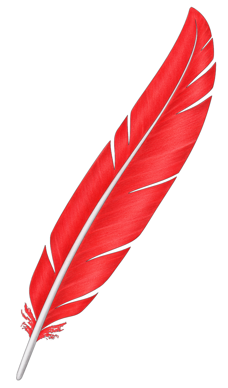 PunainenSulka